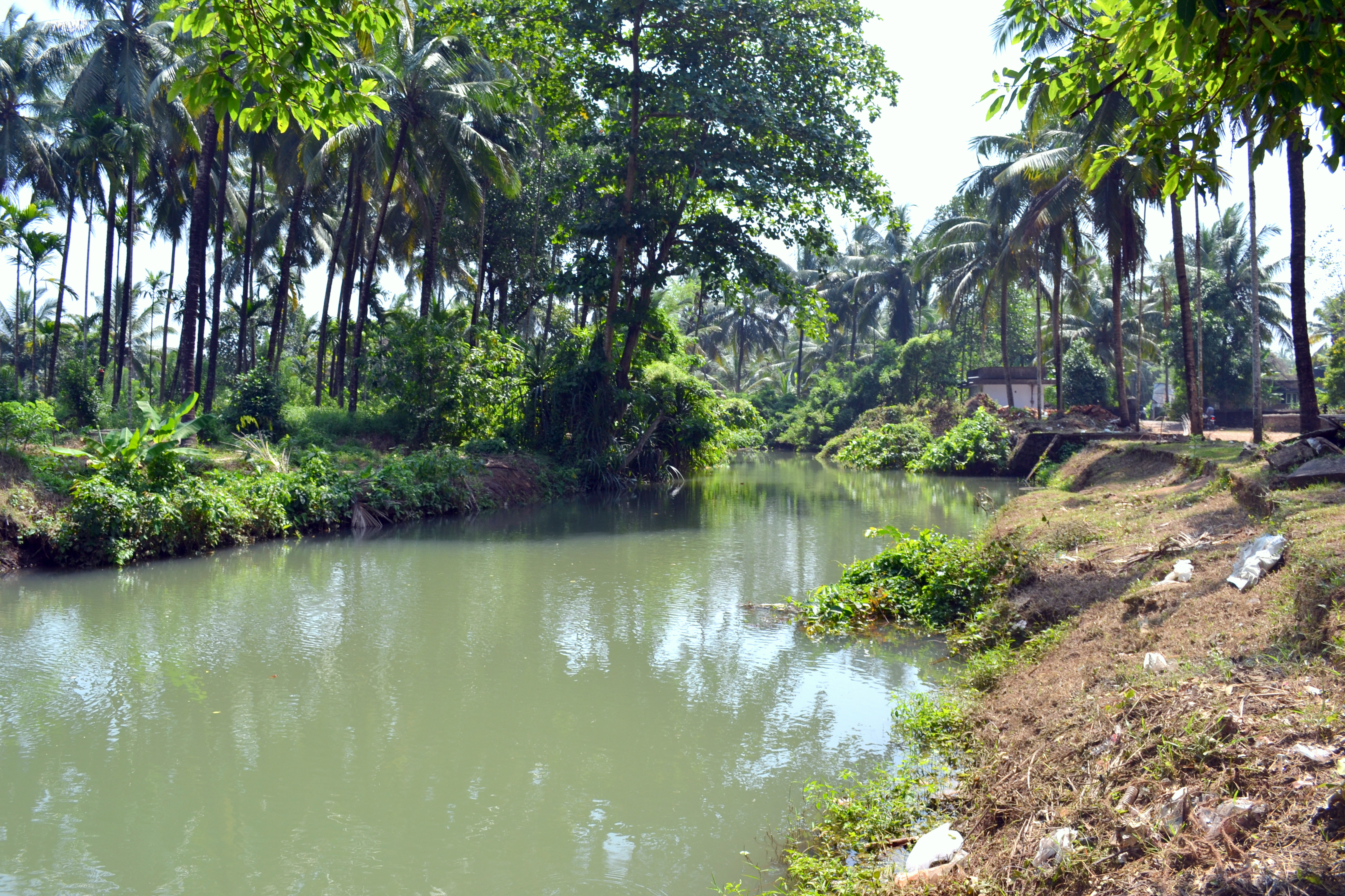 താണിക്കുടം പുഴ താണിക്കുടം ക്ഷേത്രത്തിനരികിൽ